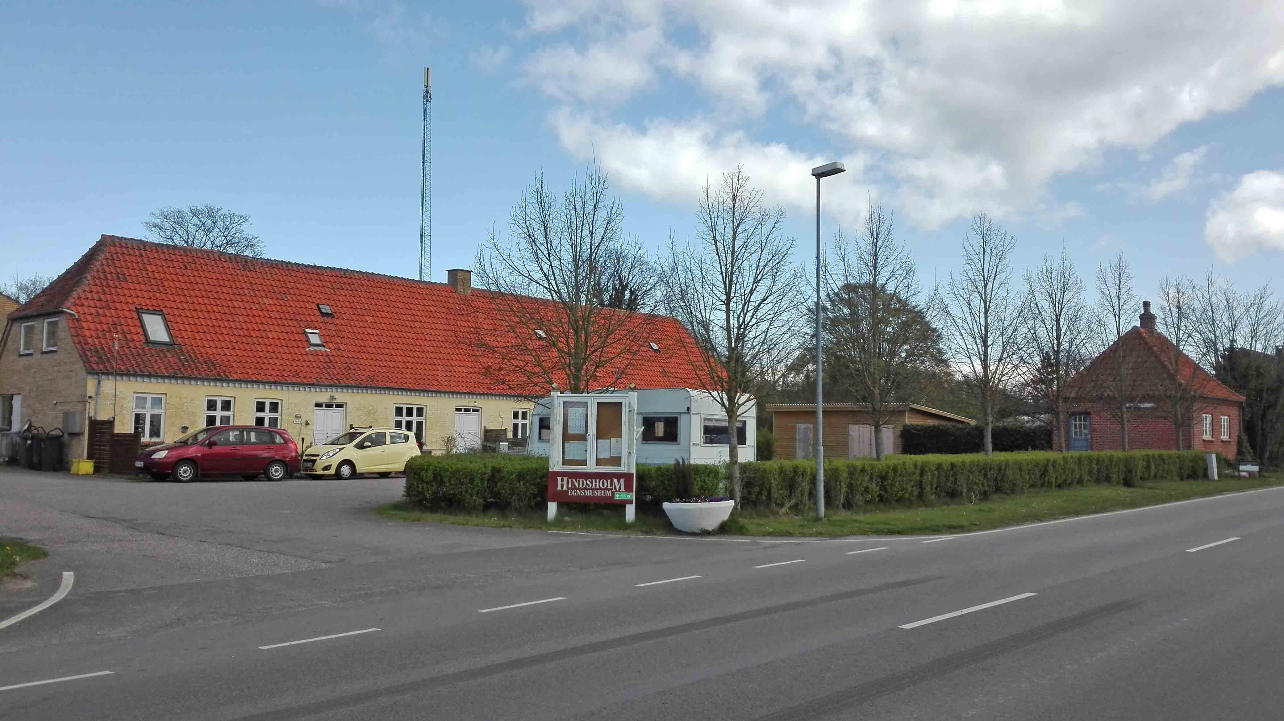 Hindsholm Egnsmuseum fra nordvest